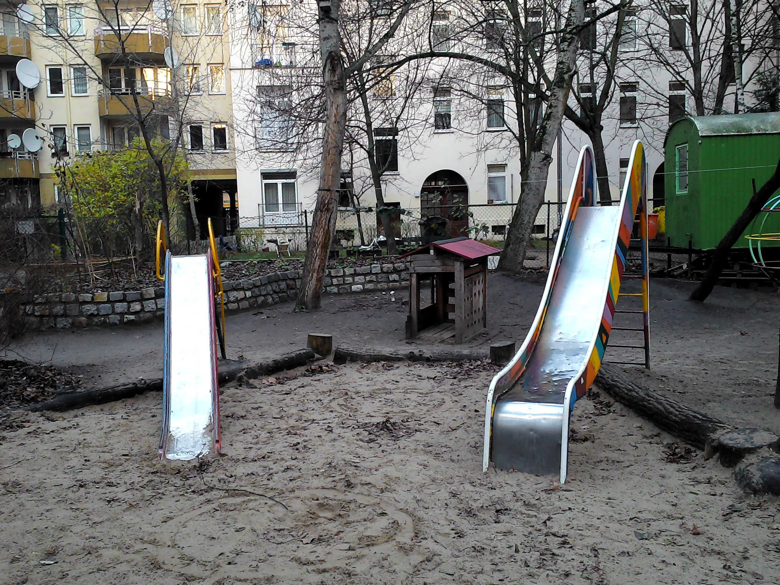 Regenbogenfabrik (Spielplatz) – 1981 besetztes und heute legales Alternativprojekt in Berlin-Kreuzberg, Germany.